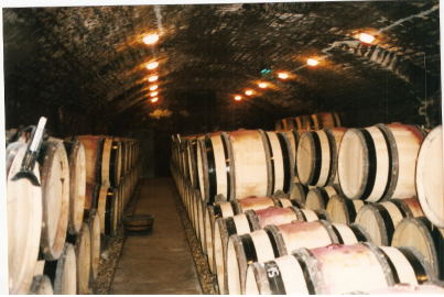 Toneis de vinho / wine barrels da Domanine Romanée-Conti